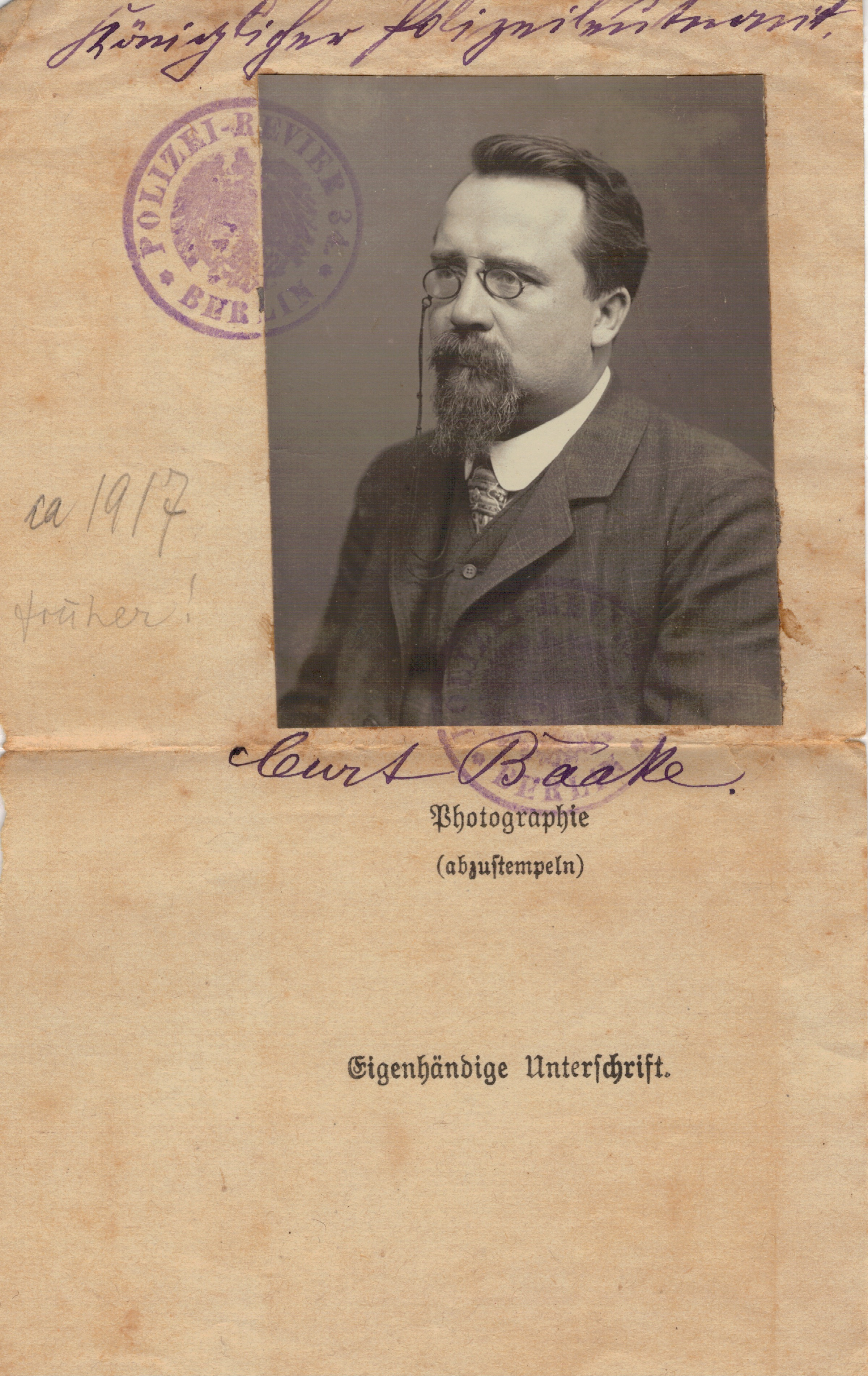 Curt Baake polizeiliches Ausweisbild und Unterschrift, 1917